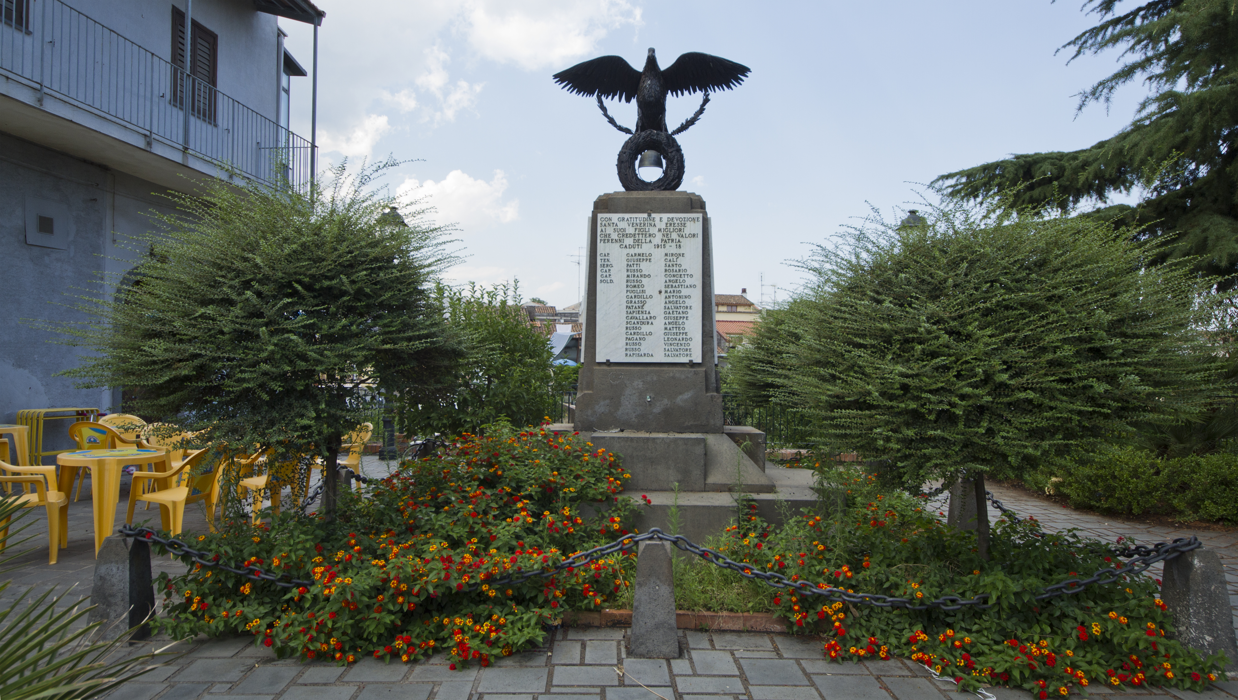 Monumento ai caduti delle guerre